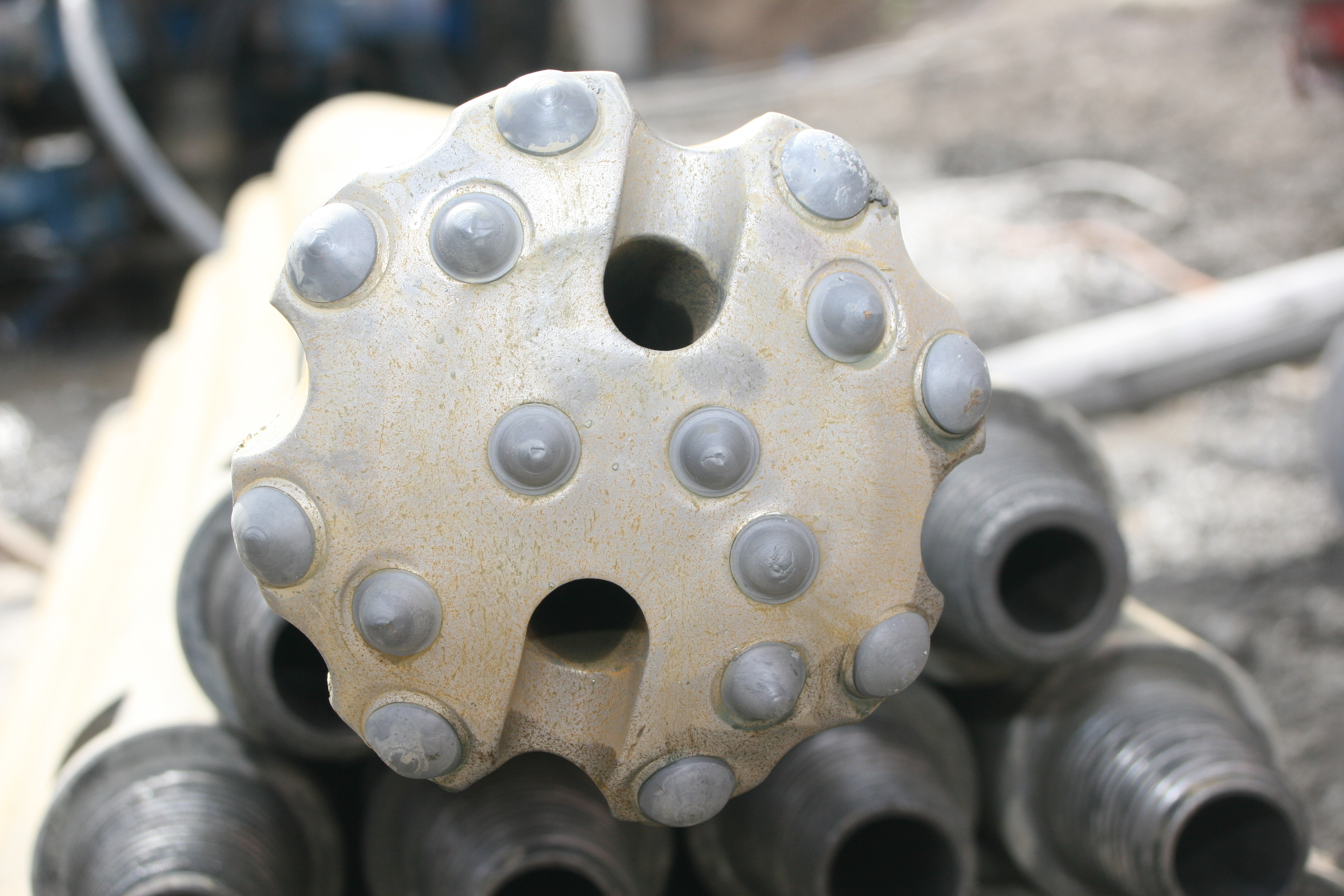 Bohrkopf für eine Geothermiebohrung